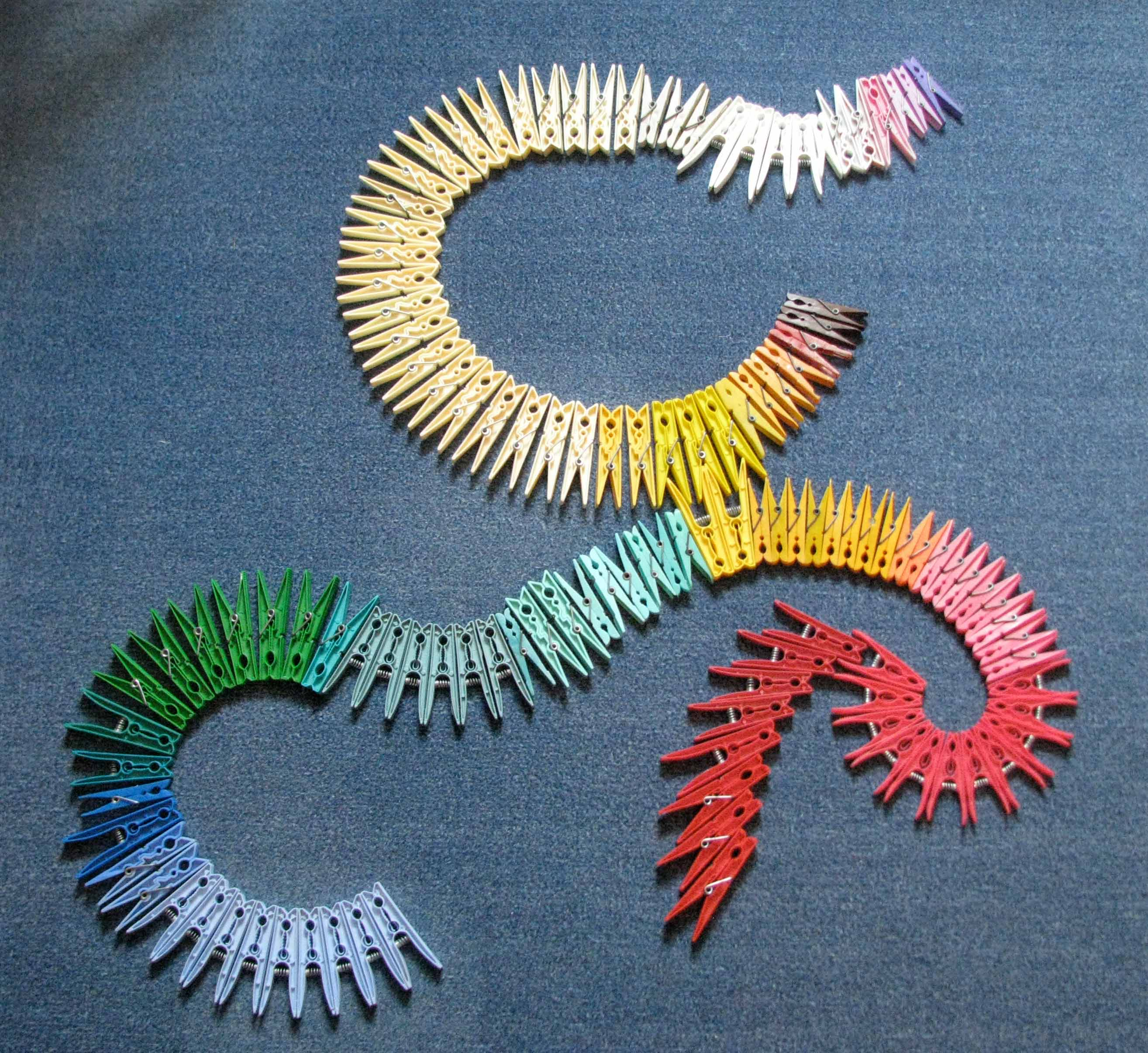 Différentes pinces à linges